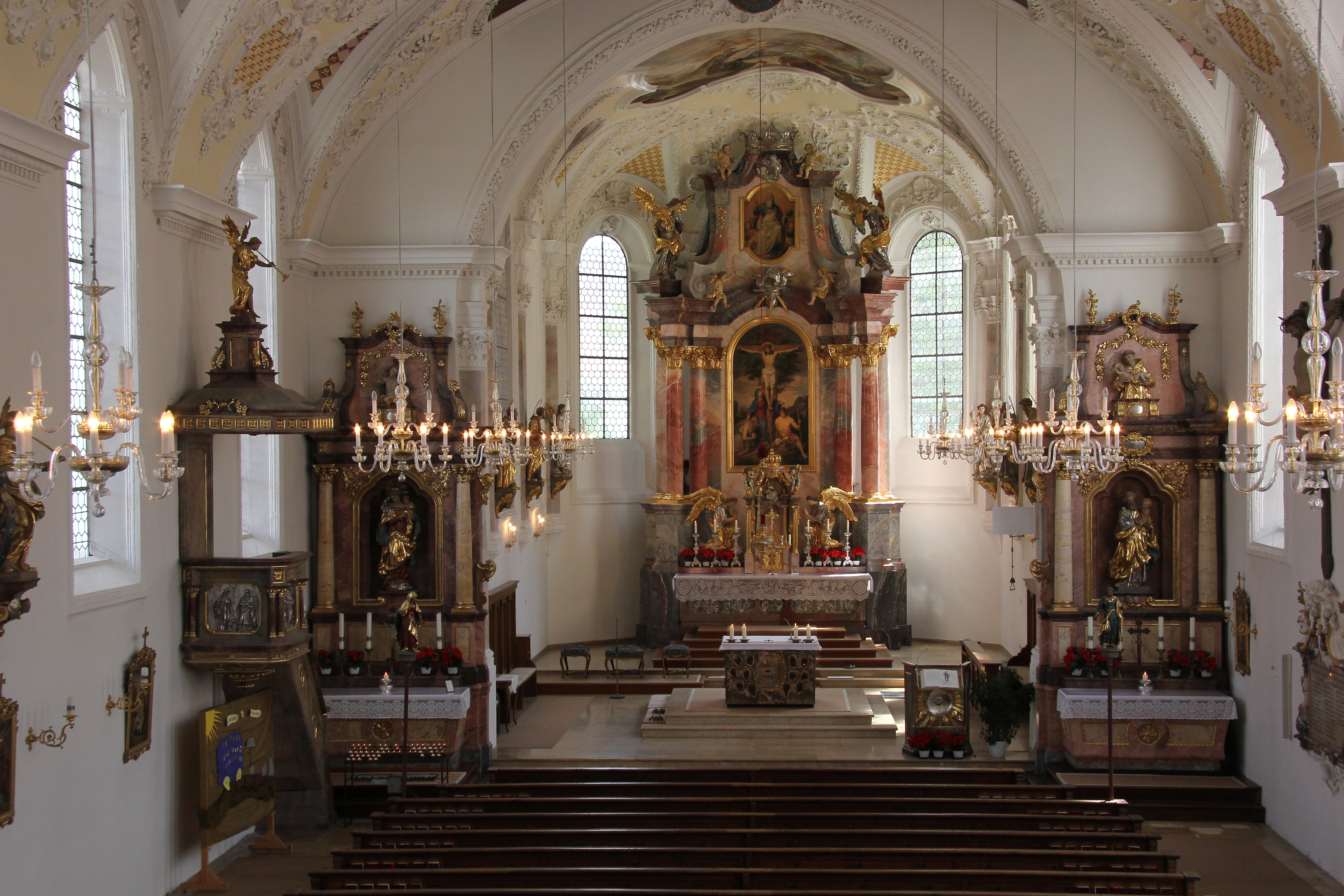 Pfarrkirche St. Justina, Bad Wörishofen, Chor und Langhaus innen